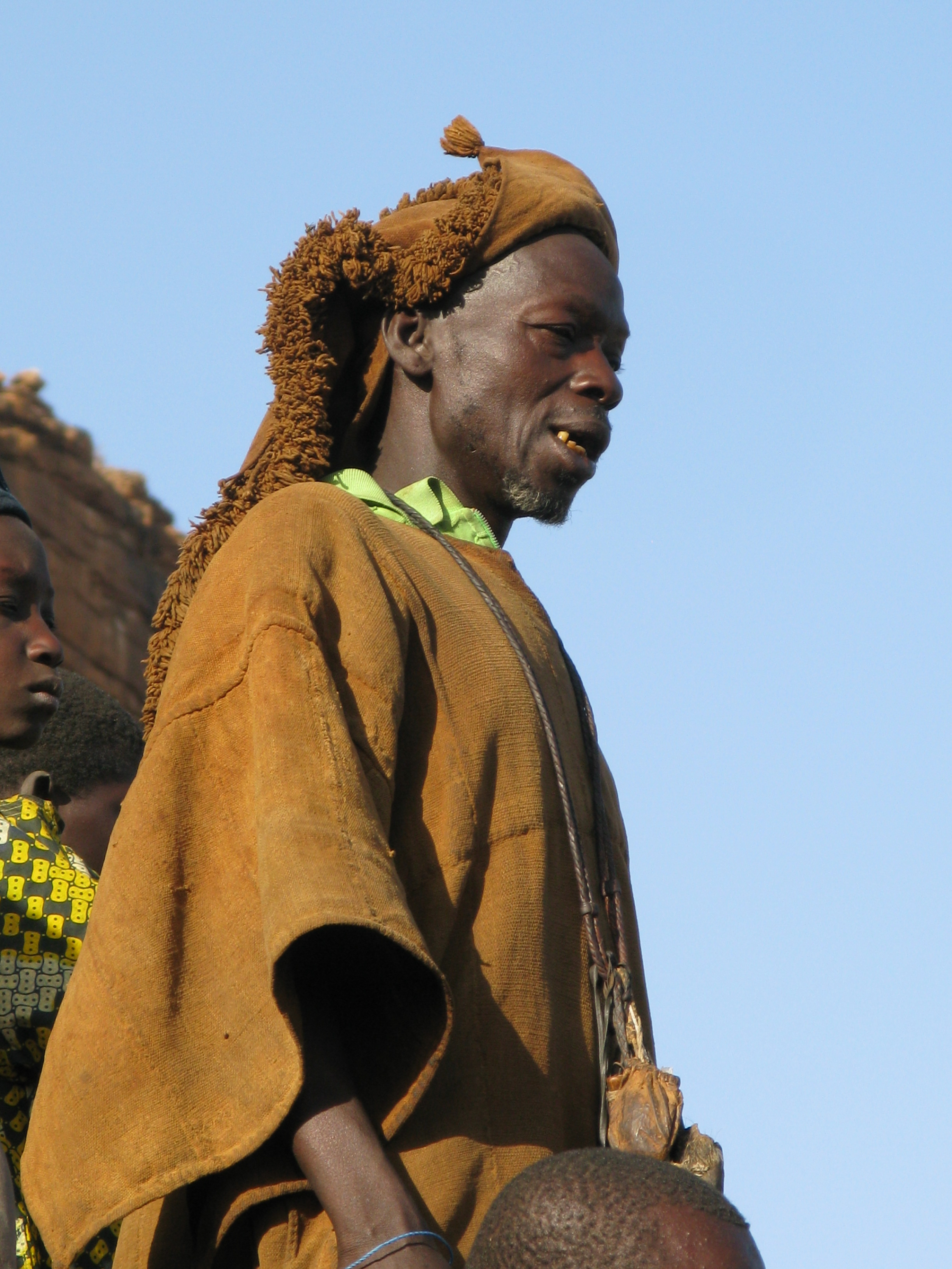 Griot This is an image of Cultural Fashion or Adornment from Mali